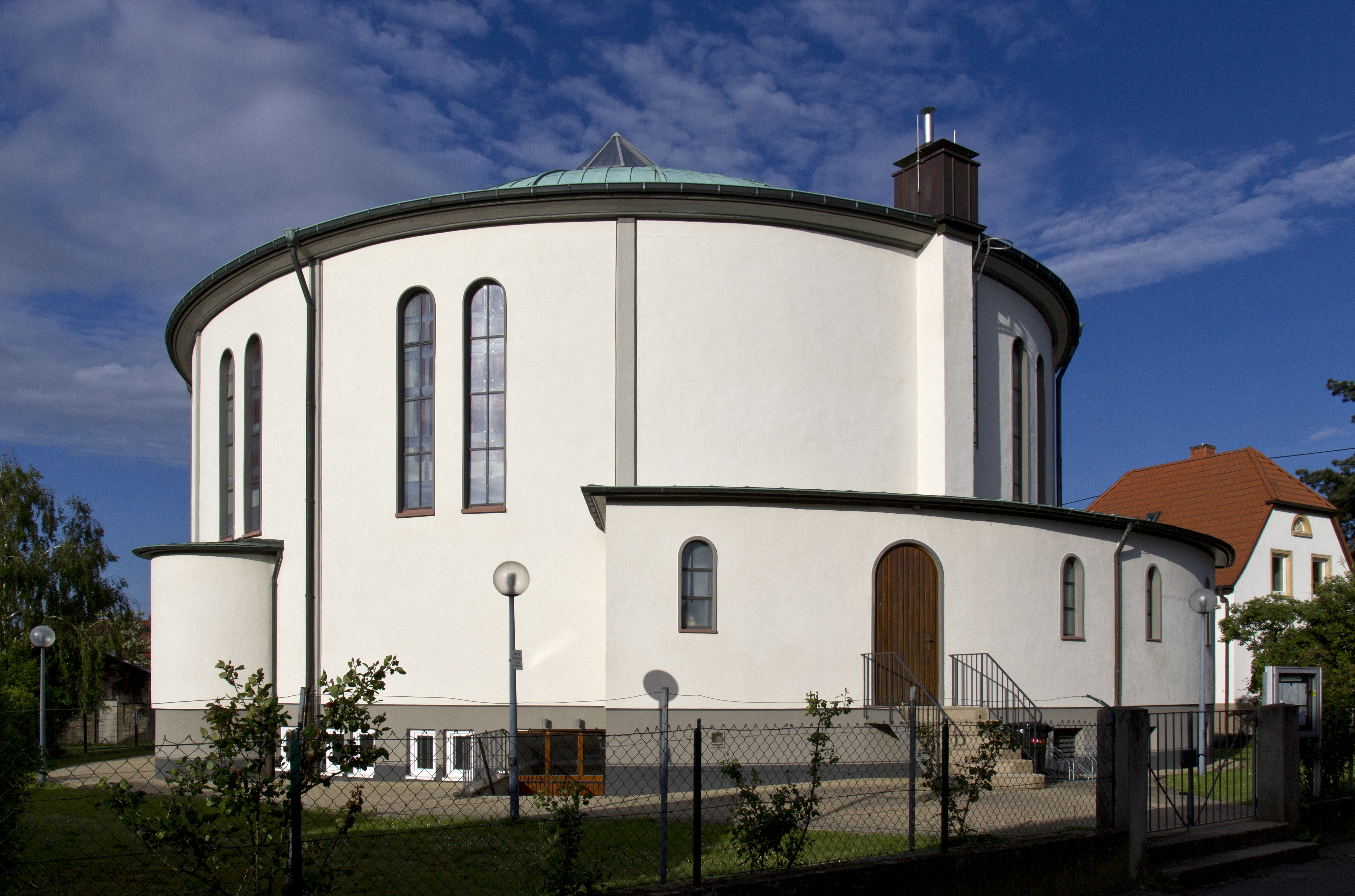 Die Neue Johanneskirche in Neustadt an der Weinstraße, Stadtteil Mußbach